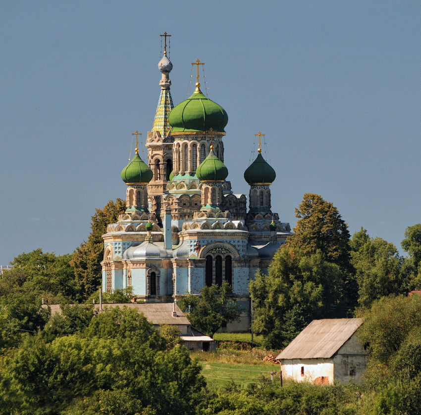 Catedrala lipovenească „Adormirea Maicii Domnului” din Fântâna Albă, raionul Adâncata, regiunea Cernăuți, Ucraina